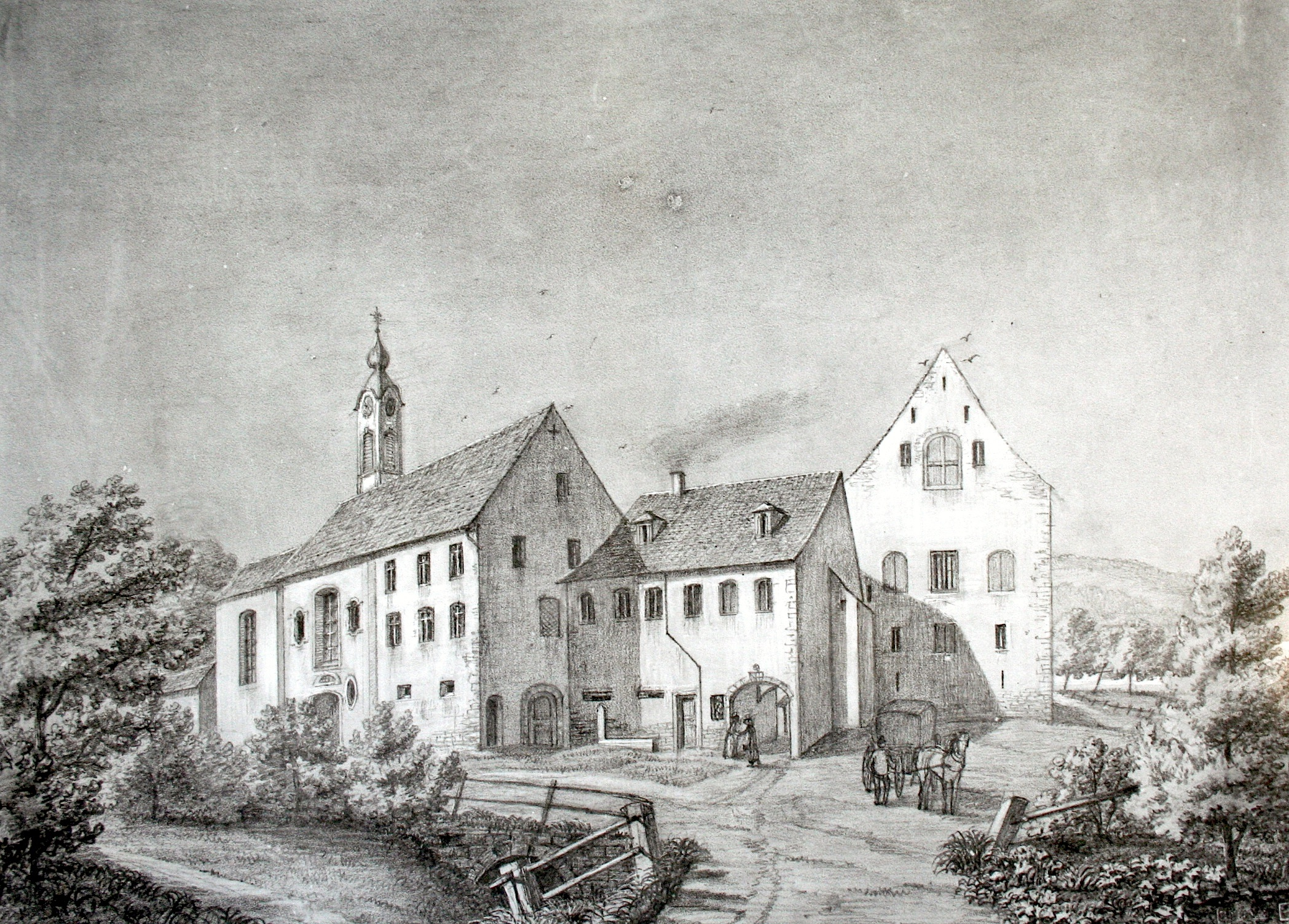 Kloster Wurmsbach: Nordansicht der Kirche, Abtei und Gästehaus. Federzeichnung von Joh. Rudolf Rahn